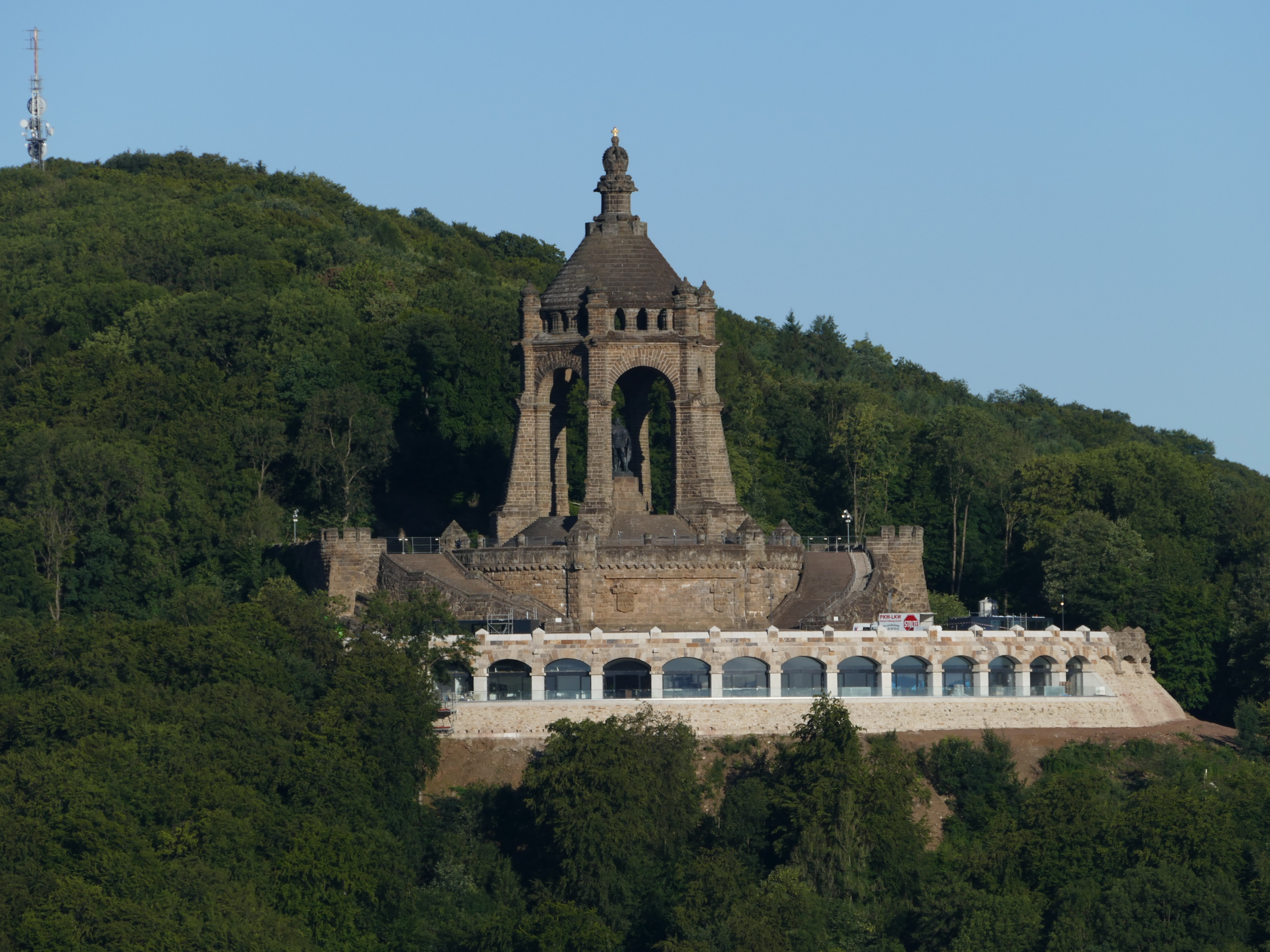 Das Kaiser-Wilhelm-Denkmal in Porta Westfalica mit der wiedererrichteten Ringterrasse.